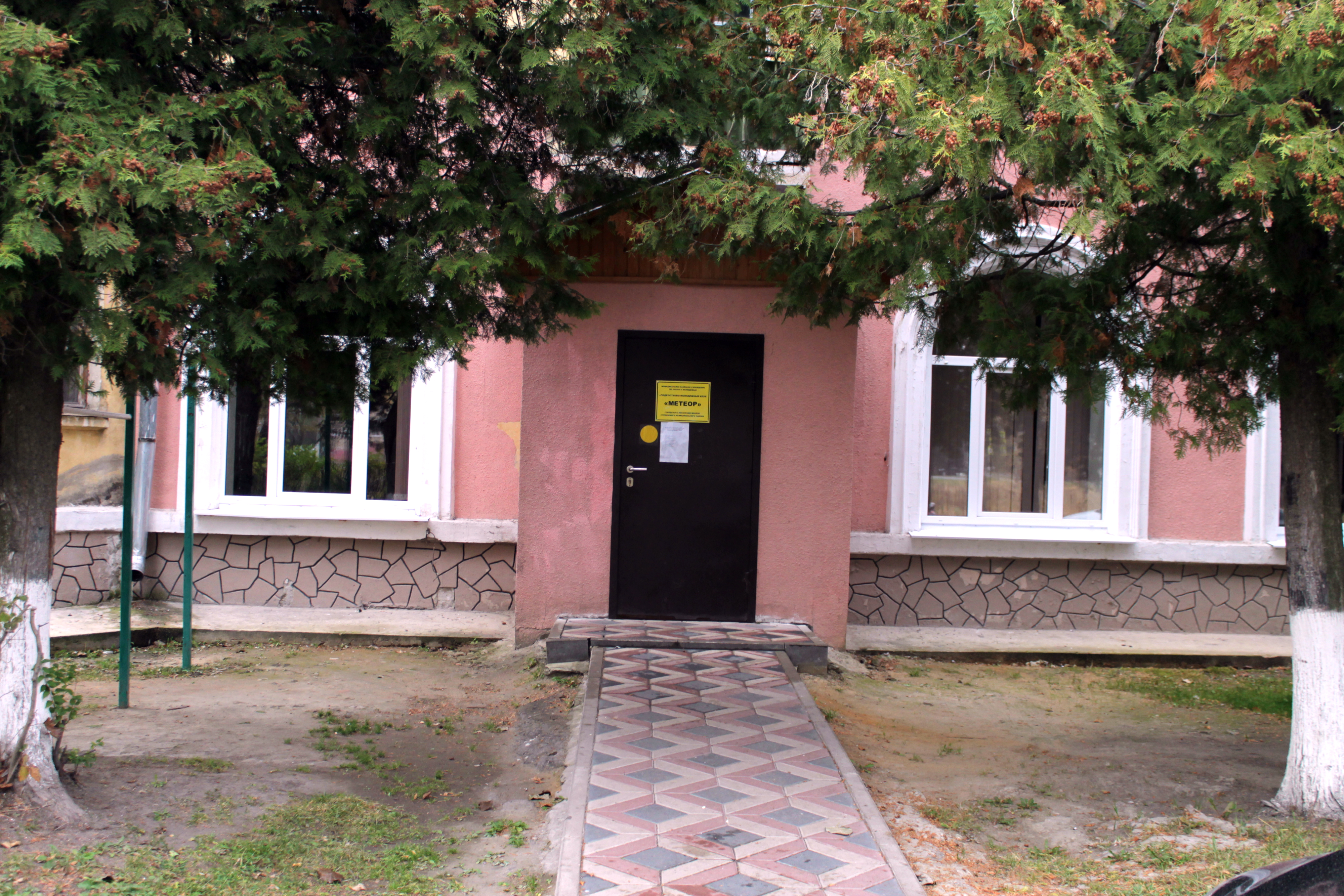 Вид спортивного клуба метеор